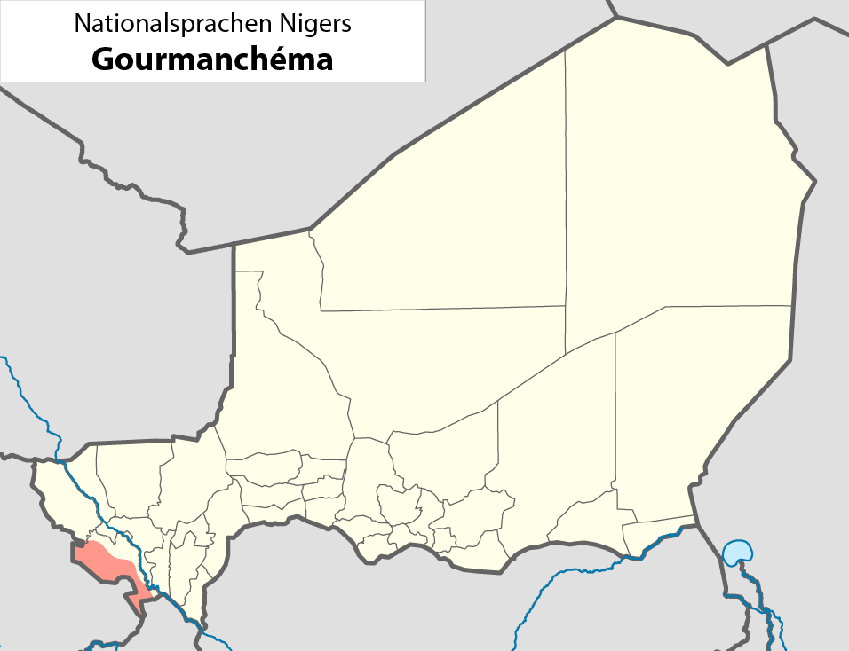 Nationalsprachen des NigerDie dargestellte Nationalsprache kann dem Dateinamen entnommen werden.